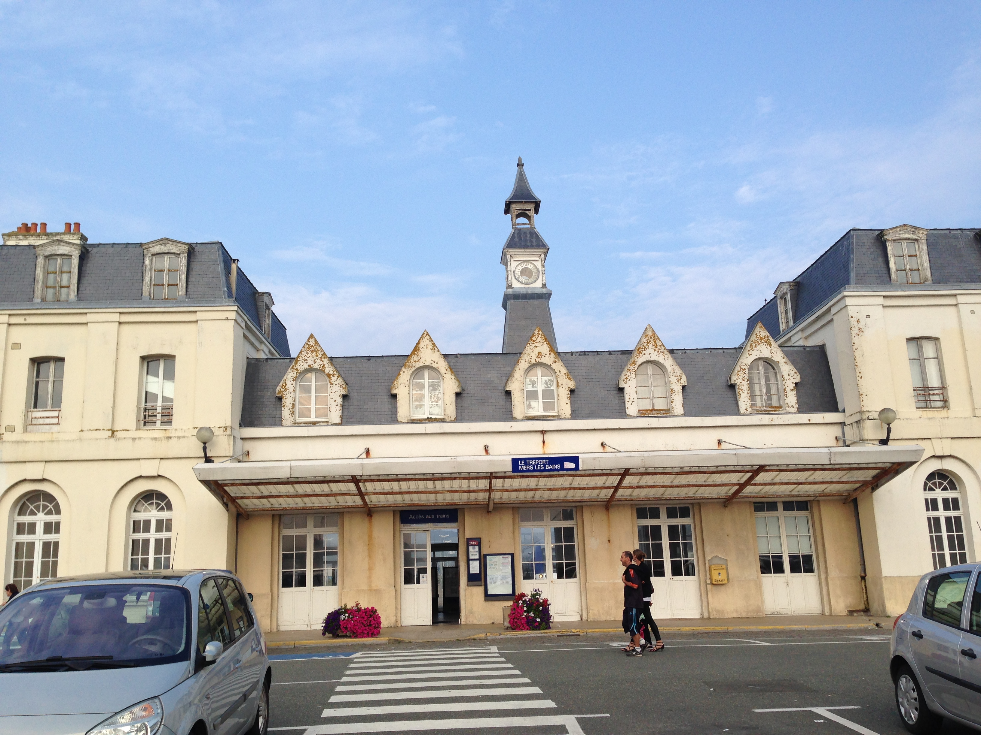 Gare du Tréport - Mers, en 2014